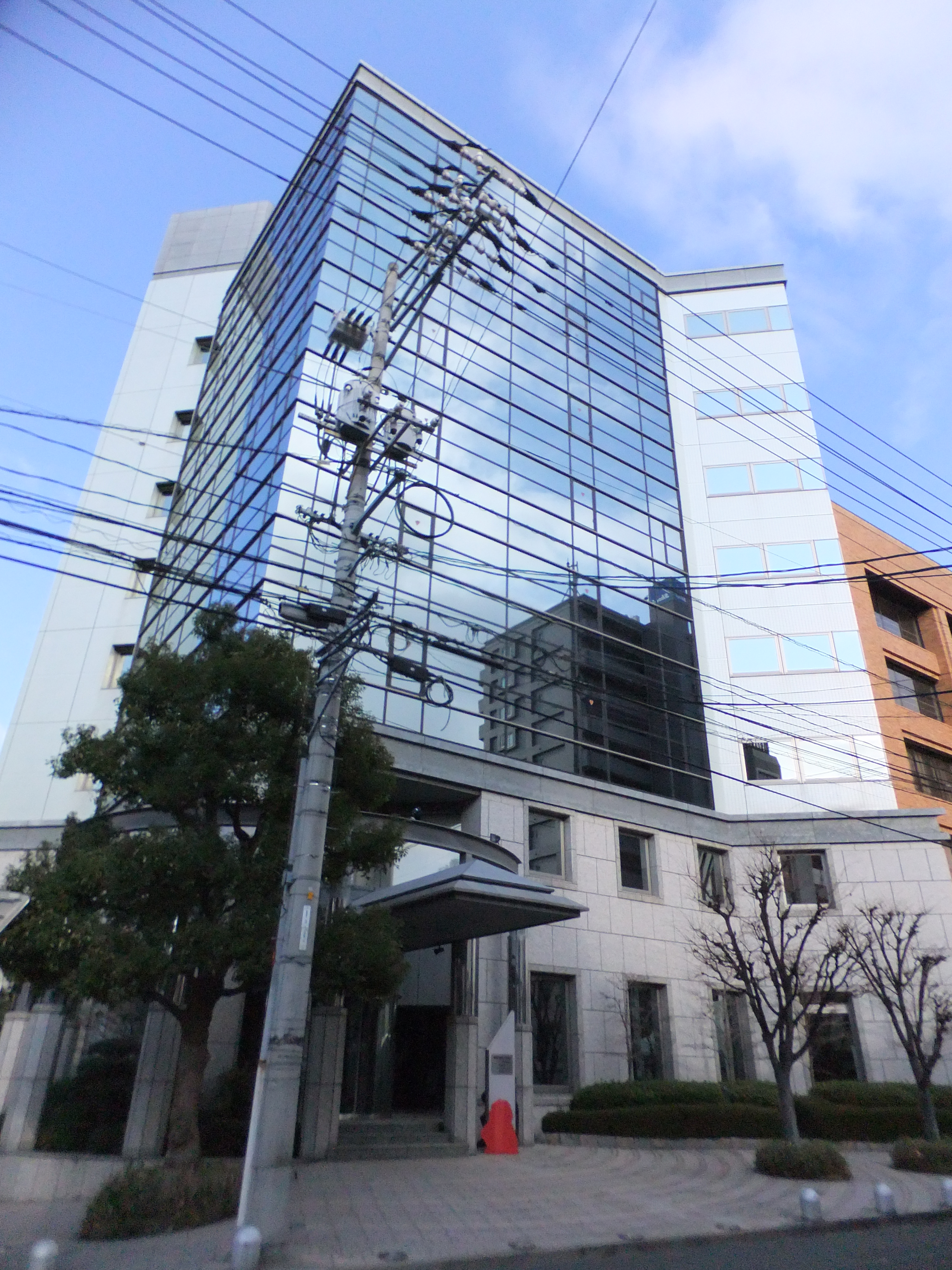 第一学習社本社